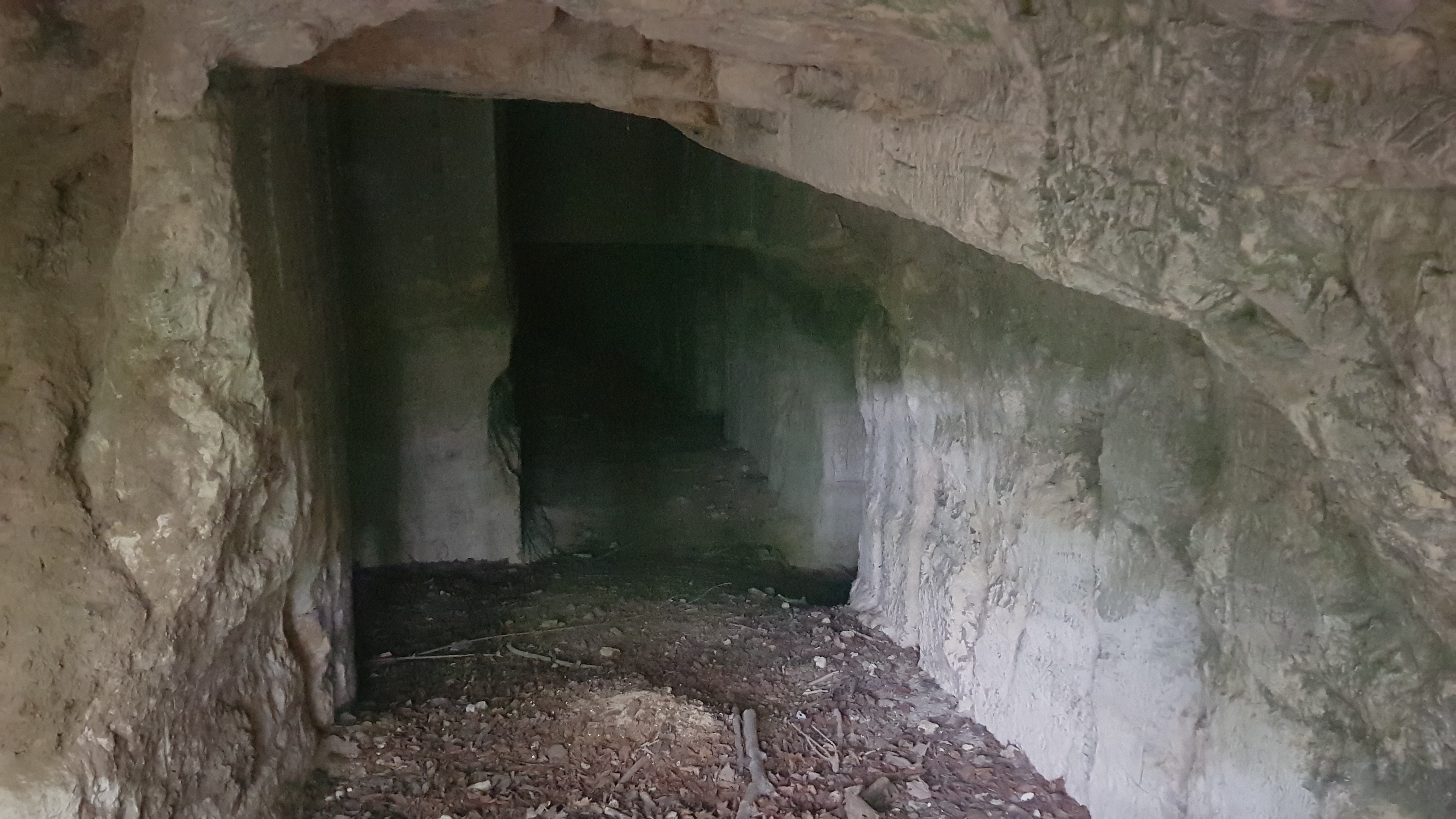 Kleinberggroeve Noord in Savelsbos, Gronsveld, Nederland